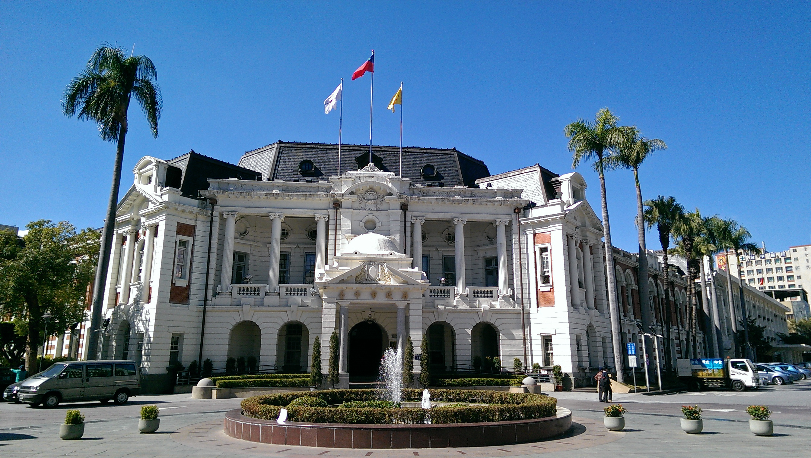 中文（台灣）: 台中州廳（舊台中市政府）